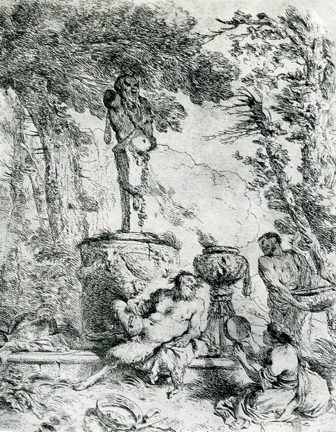 Свято бога Пана: офорт